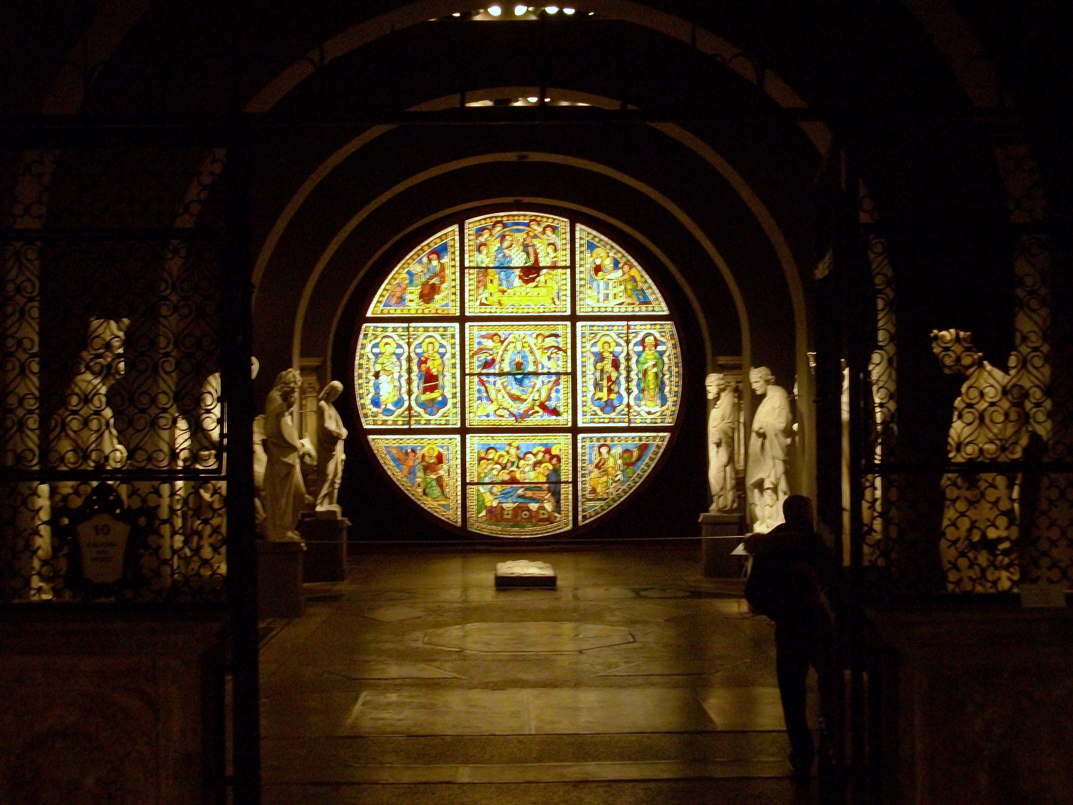 Interior del Museo dell'Opera del Duomo de Siena.